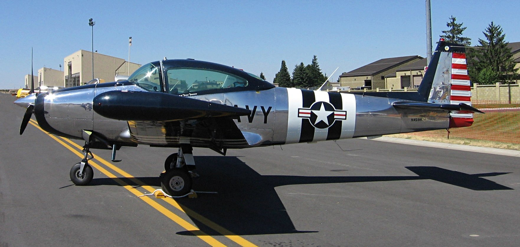 N4591K - 1958 Ryan Navion A